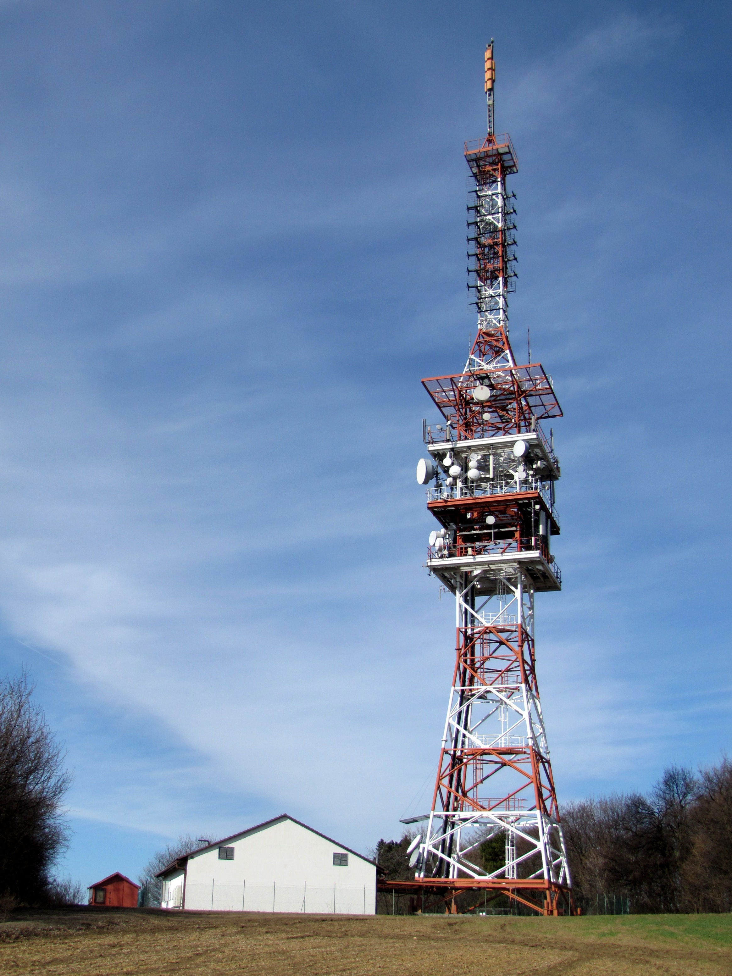 Vysílač na Babím lomu v obci Strážovice